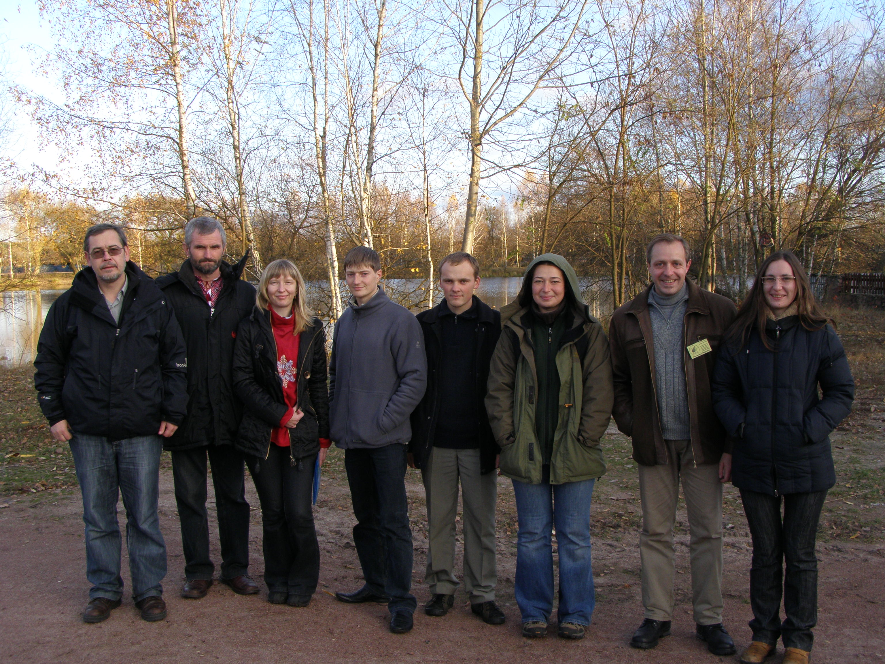 Теріошкола 2009